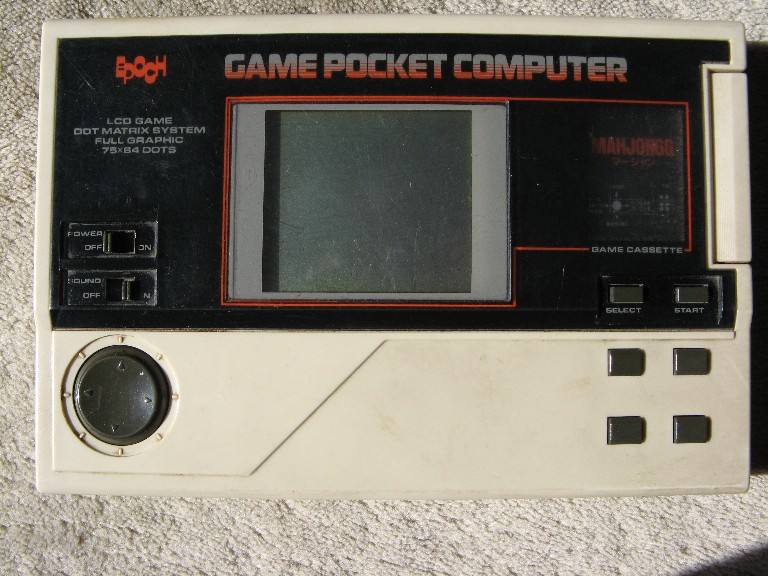 エポック社のゲームポケコン